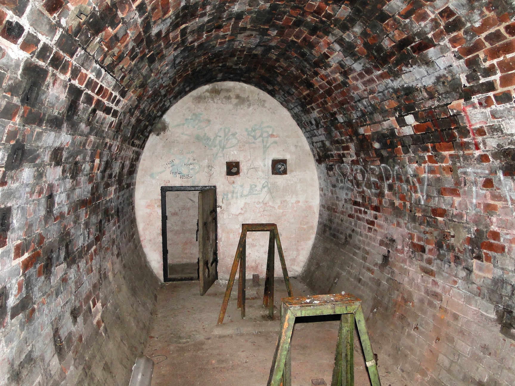 Podziemia nad Jeziorem Szmaragdowym